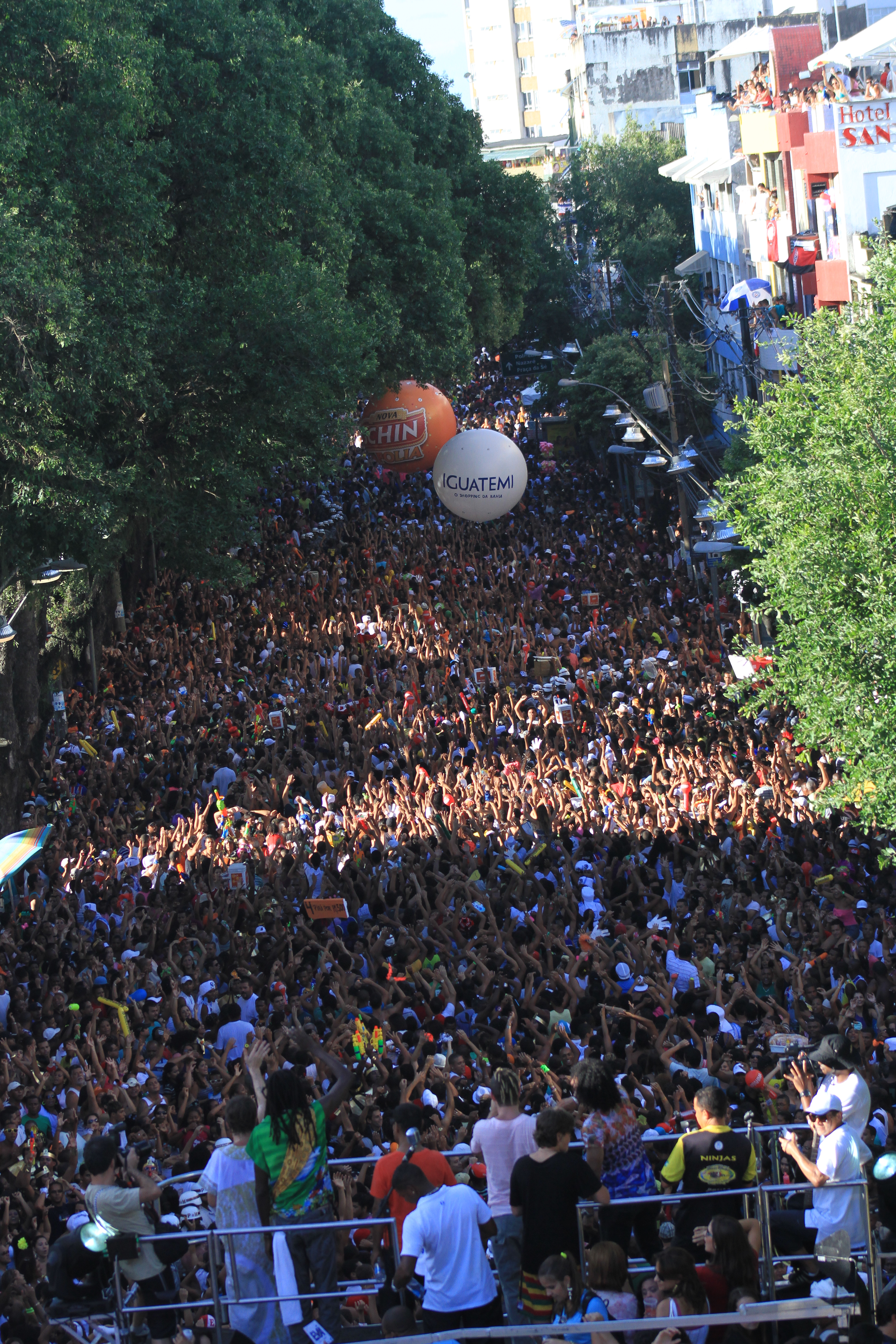 Banda Eva no Circuito Osmar em (21.02). Foto: Tatiana Azeviche - Setur